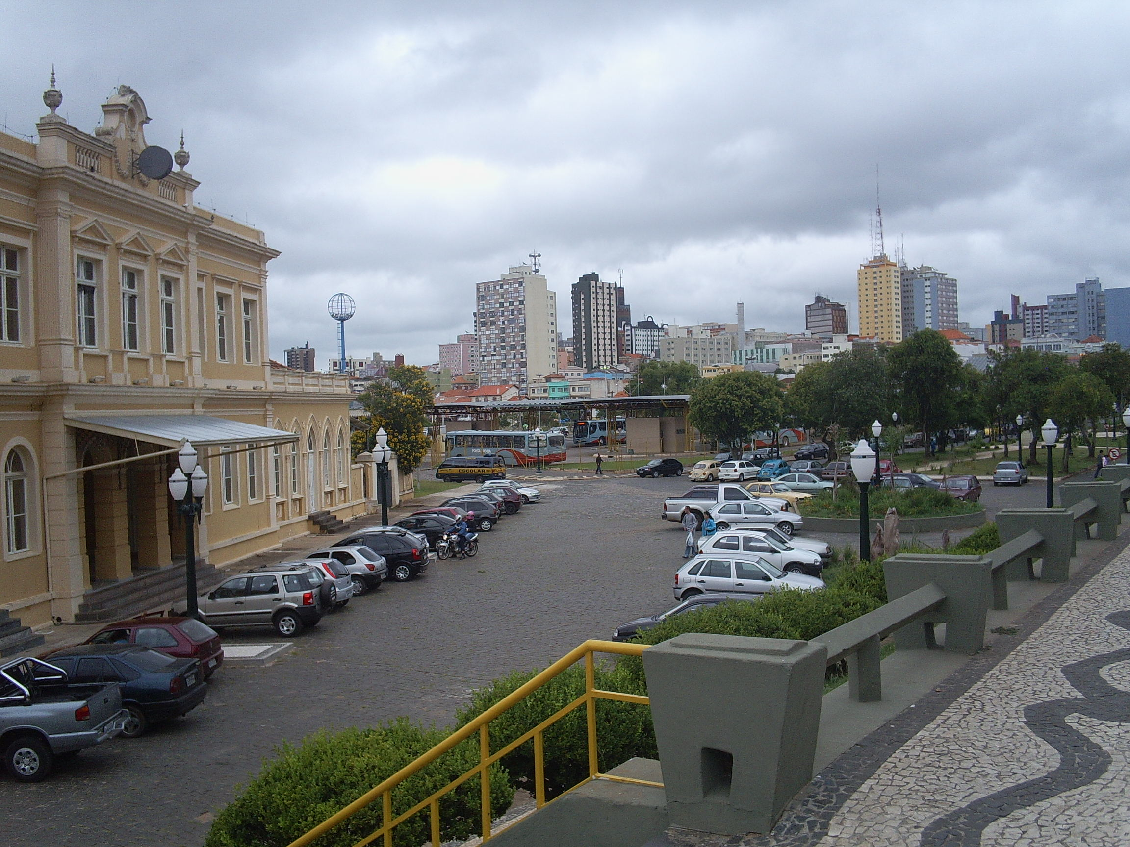 Ponta Grossa, Brasil – A Biblioteca Mucipal, antiga estação ferroviária